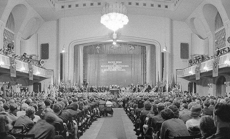 Jehmlich-Orgel in der Kongreßhalle Leipzig, links und rechts der Bühne (Bachfeier 1950)